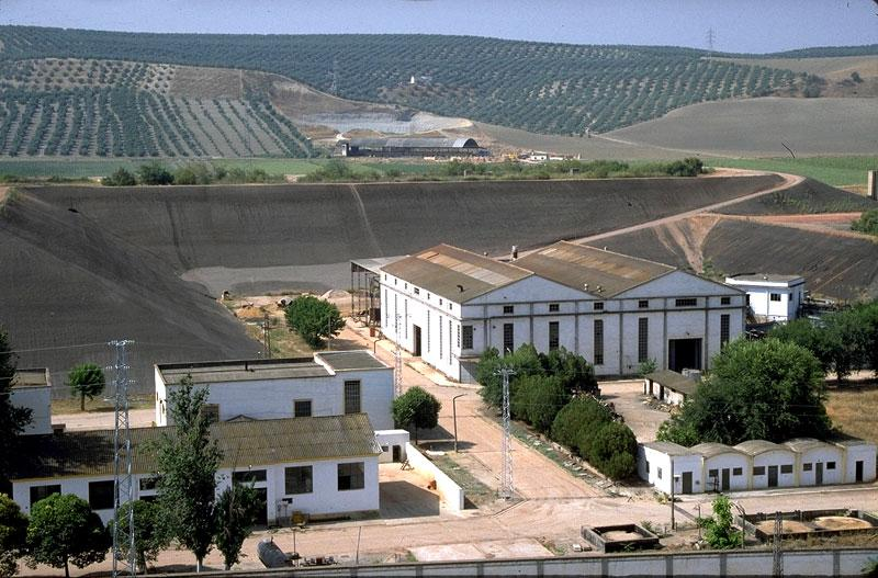 Antiguas instalaciones de la Fábrica de Uranio de Andújar (FUA)